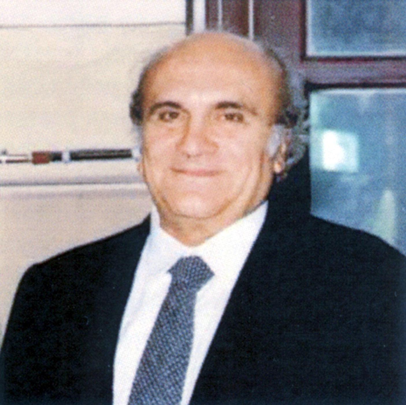 Gaetano Salvatore